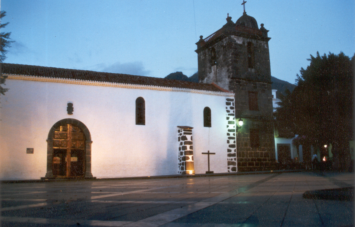 Fotografía nocturna de la plaza España de Los Llanos de Aridane, en la Isla de La Palma (Islas Canarias, España), tomada al anochecer el 22 de diciembre de 1999. Autor: Fev